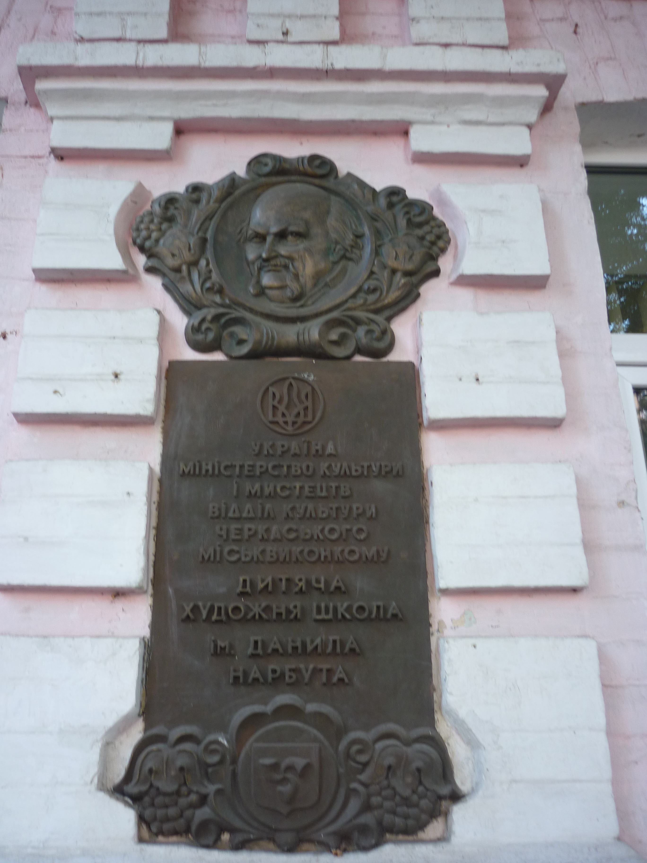 Пам'ятна дошка Нарбуту на фасаді Черкаської художньої школи